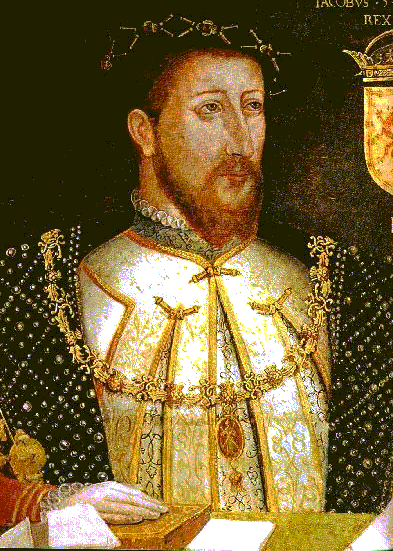 Jakob V. von Schottland, Ausschnitt aus einem Gemälde des Königs mit seiner zweiten Frau Marie de Guise